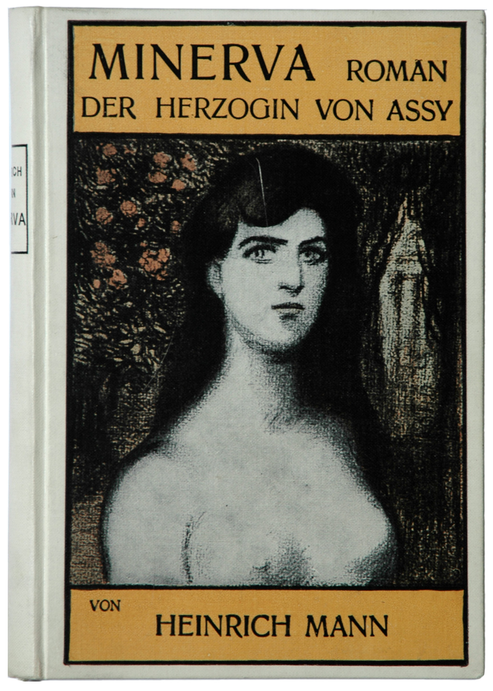 Mann, Heinrich: Die Göttinnen oder die drei Romane der Herzogin von Assy. München: Langen 1903, Bd. II: Minerva 334 S., Erstausgabe.